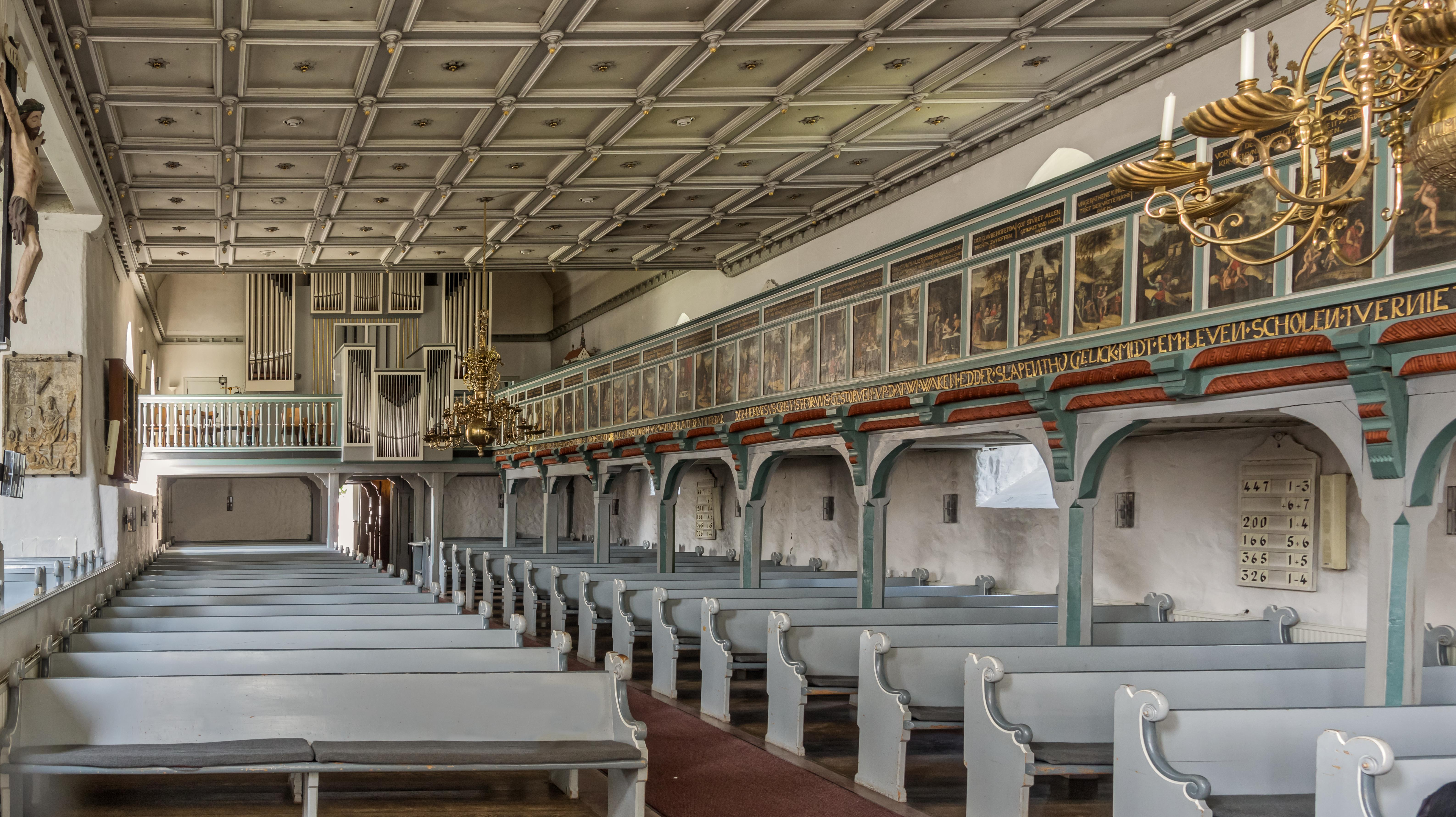 Bilder aus Heide (Holstein) St. Jürgen Kirche am Markt. Bilder von Innen und Außen